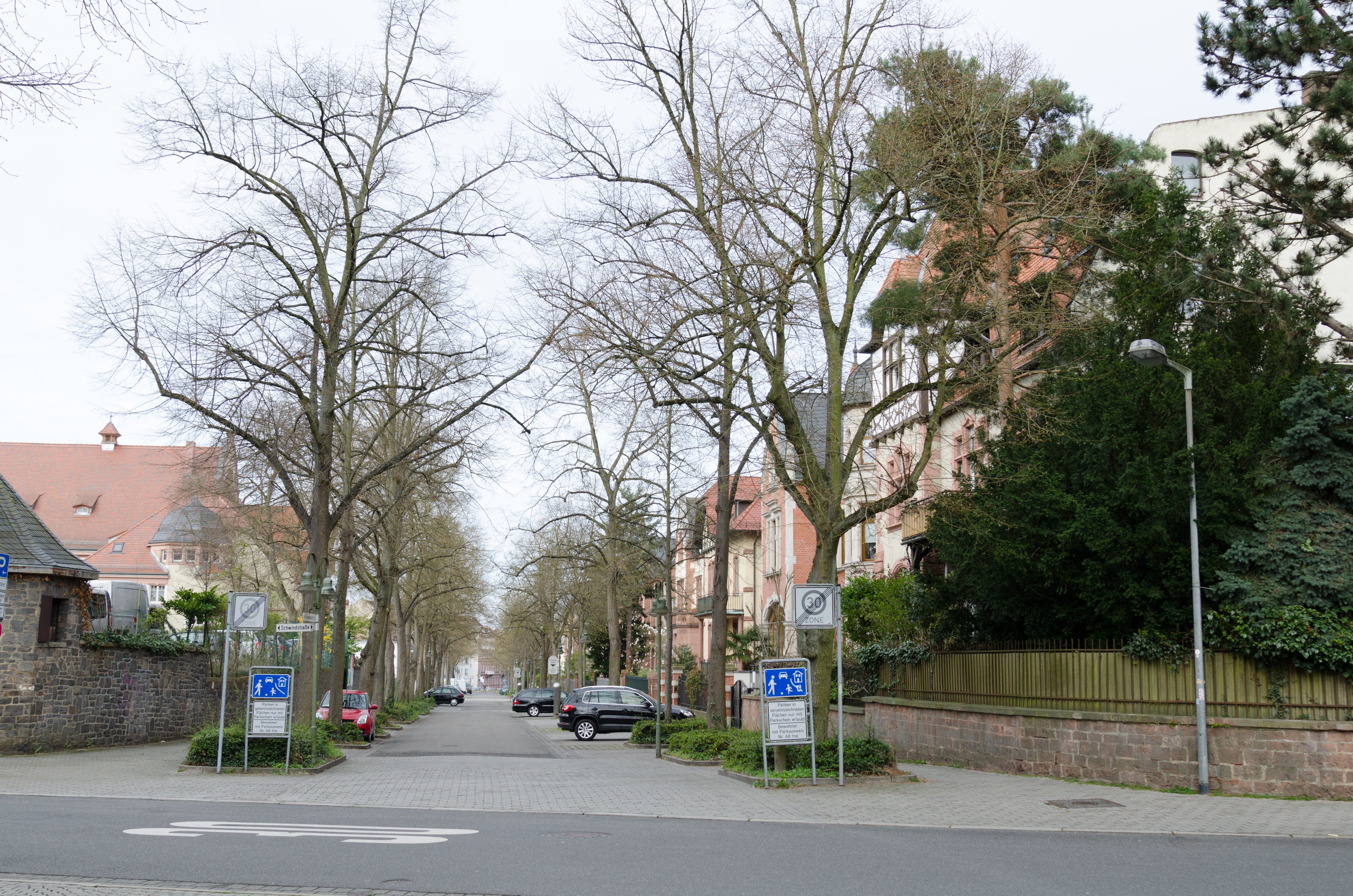 Aschaffenburg, westliche Grünewaldstraße